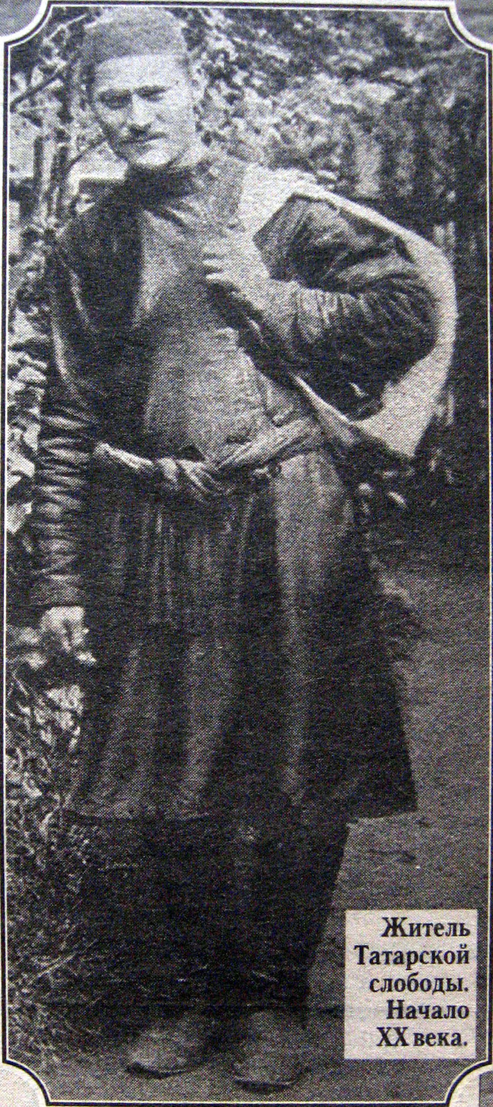 Жыхар Татарскай Слабады Мінск